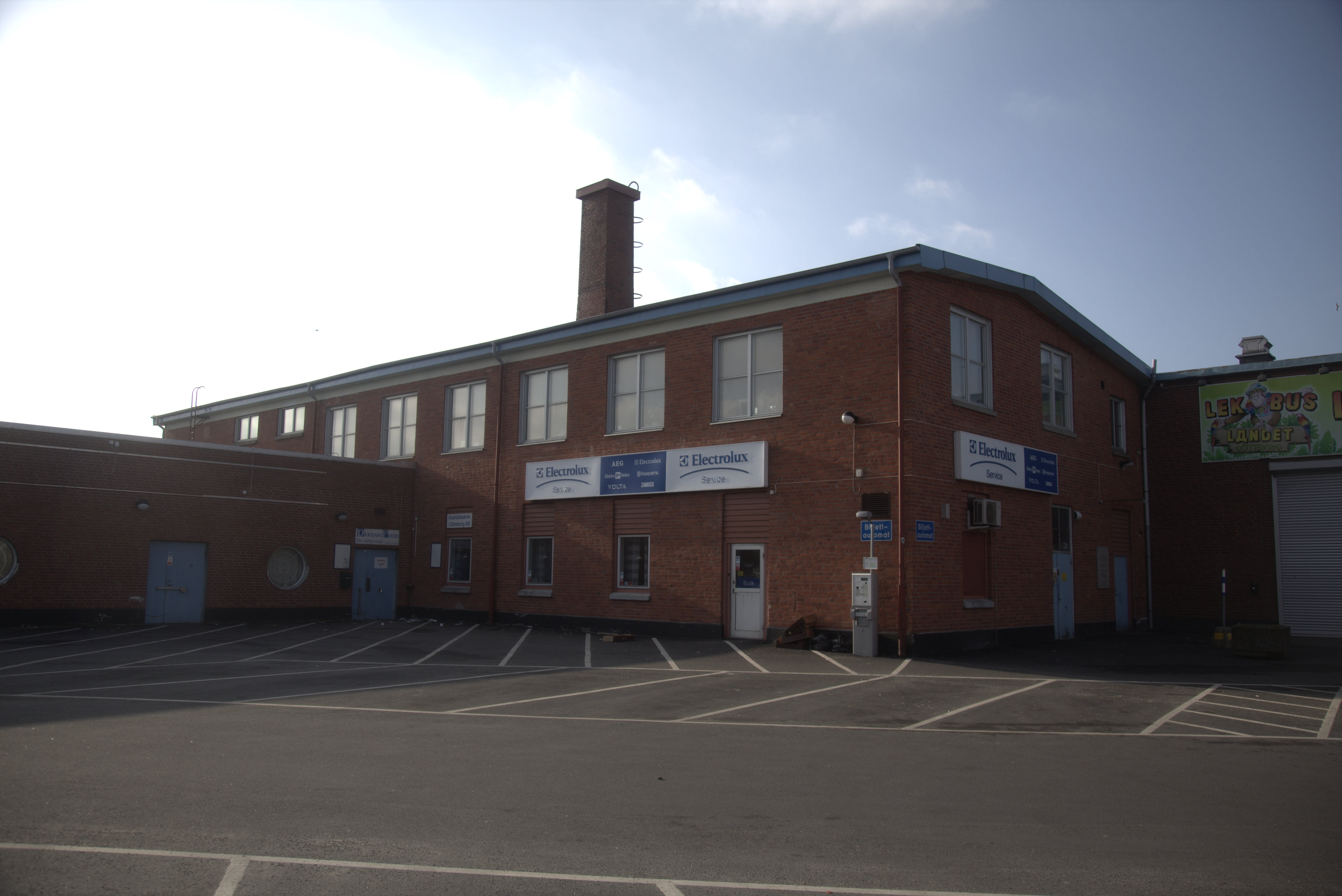 Backabrandens lokaler i mars 2015.